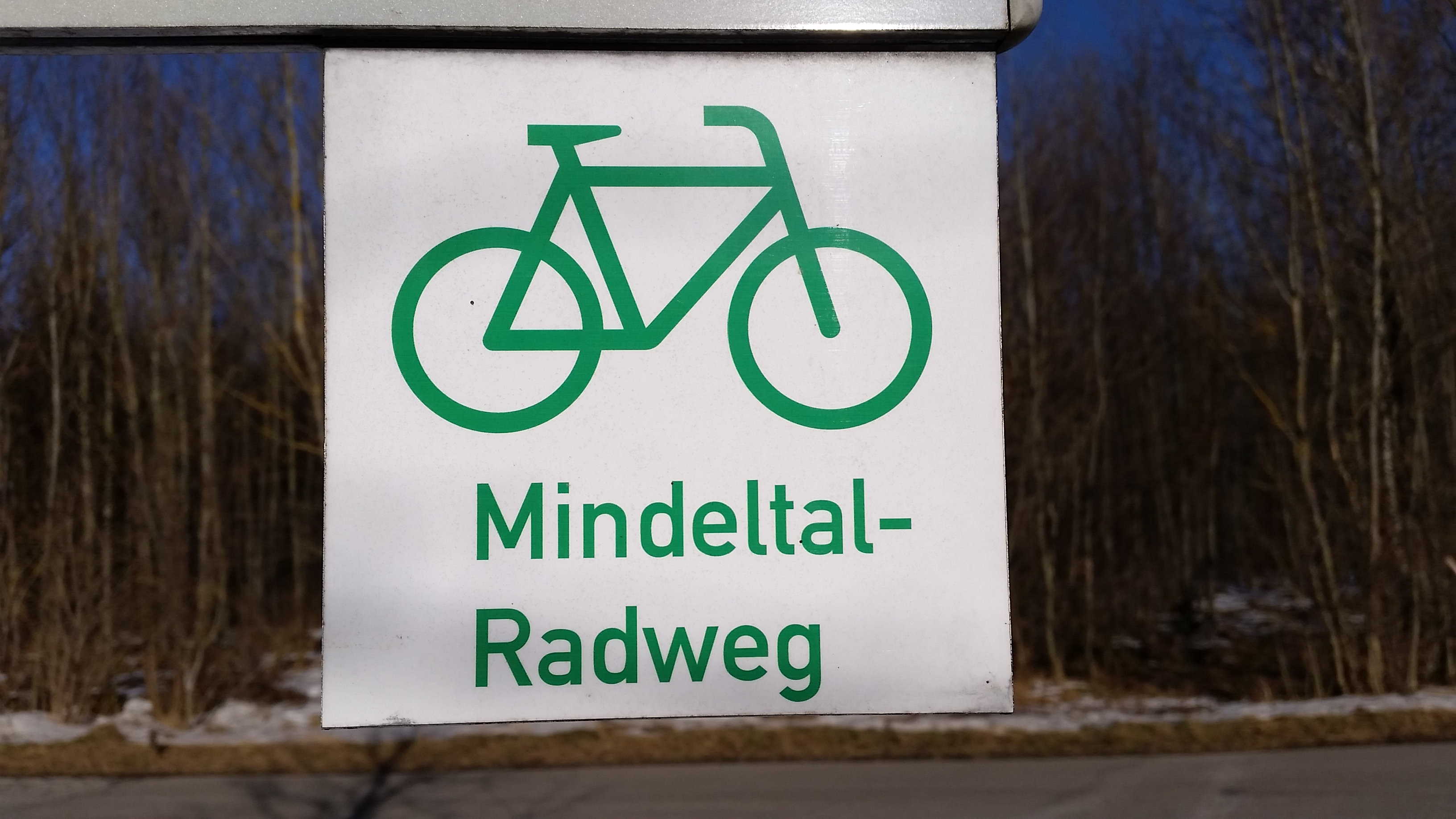 Wegweiser zum Mindeltal-Radweg bei Bayersried (Eggenthal) im Landkreis Ostallgäu, Bayern, Deutschland.